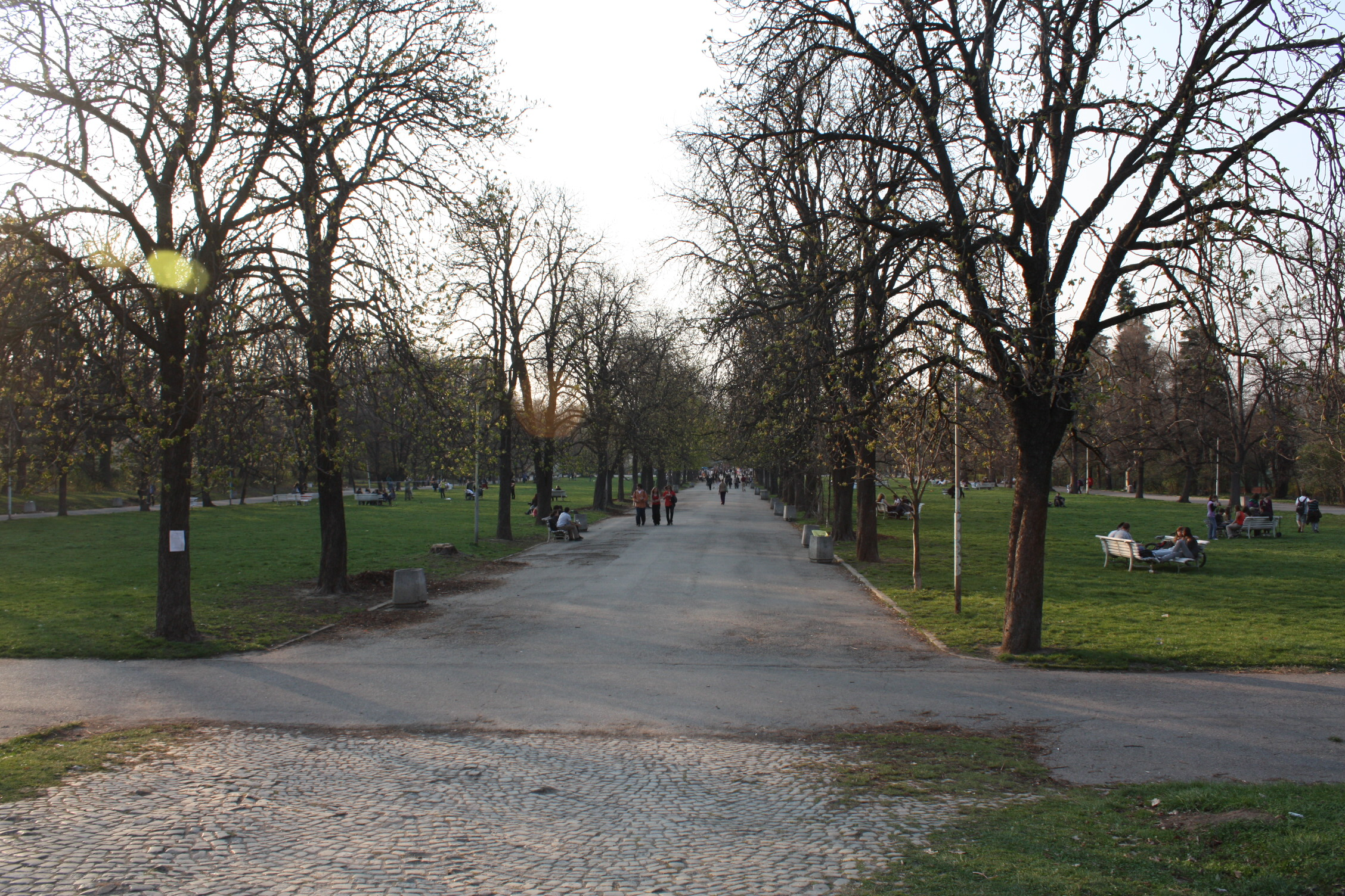 Borisova gradina, Борисова градина, Bulgaria